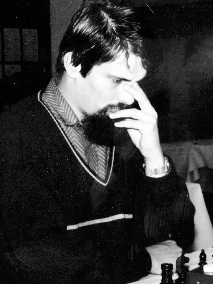 Volkhard Rührig, Deutsche Schacheinzelmeisterschaft 1987 in Bad Neuenahr